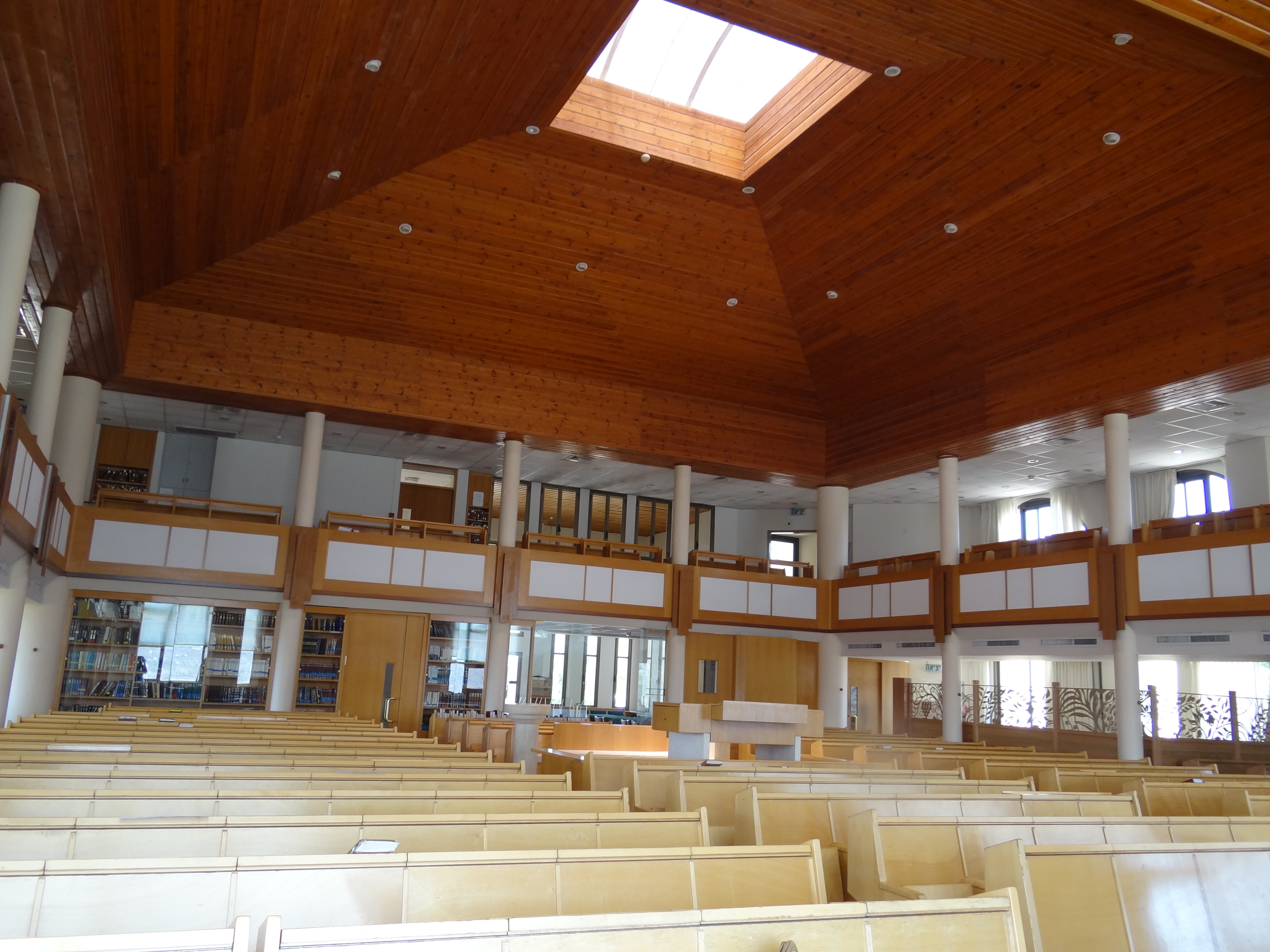 בית הכנסת המרכזי של היישוב הקהילתי הושעיה השוכן בגליל התחתון